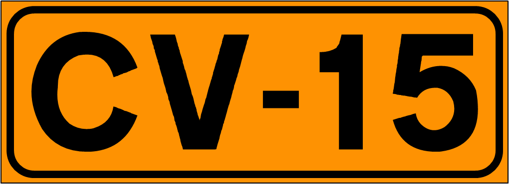 Inidcador de la Carretera de la Comunidad Valenciana CV-15